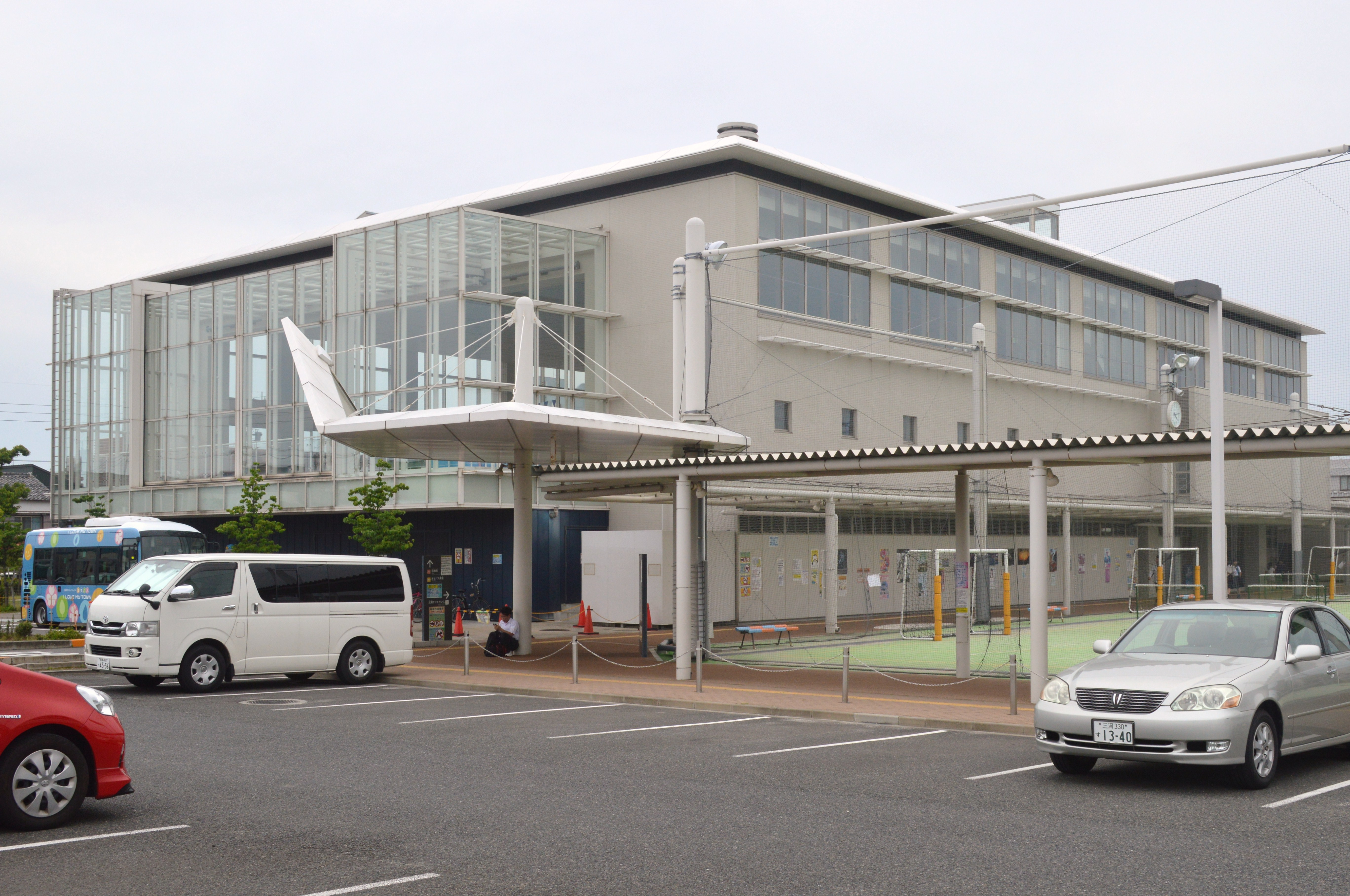 愛知県岡崎市の公共施設「岡崎げんき館」。岡崎市保健所、プール、スタジオ、トレーニングジム、広場、情報ライブラリー、ギャラリーなどからなる。